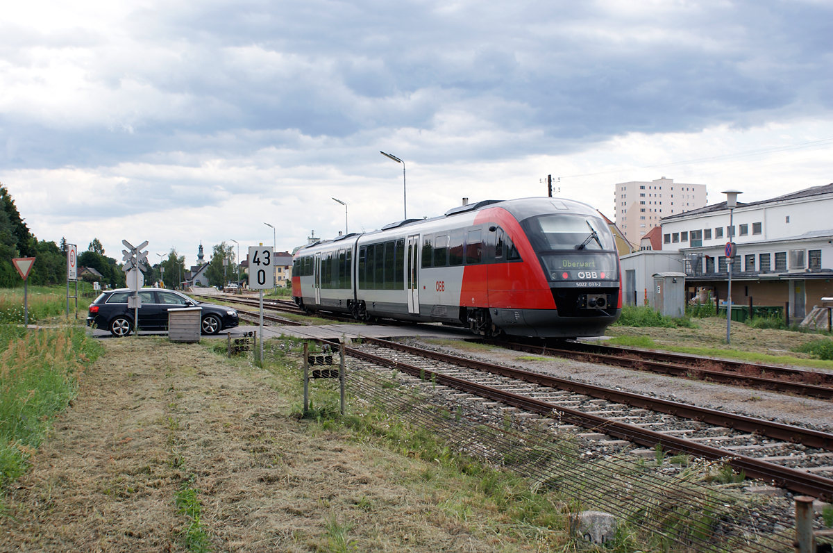 Dieseltriebwagen 5022 033 bei der Einfahrt in den Bahnhof Oberwart.